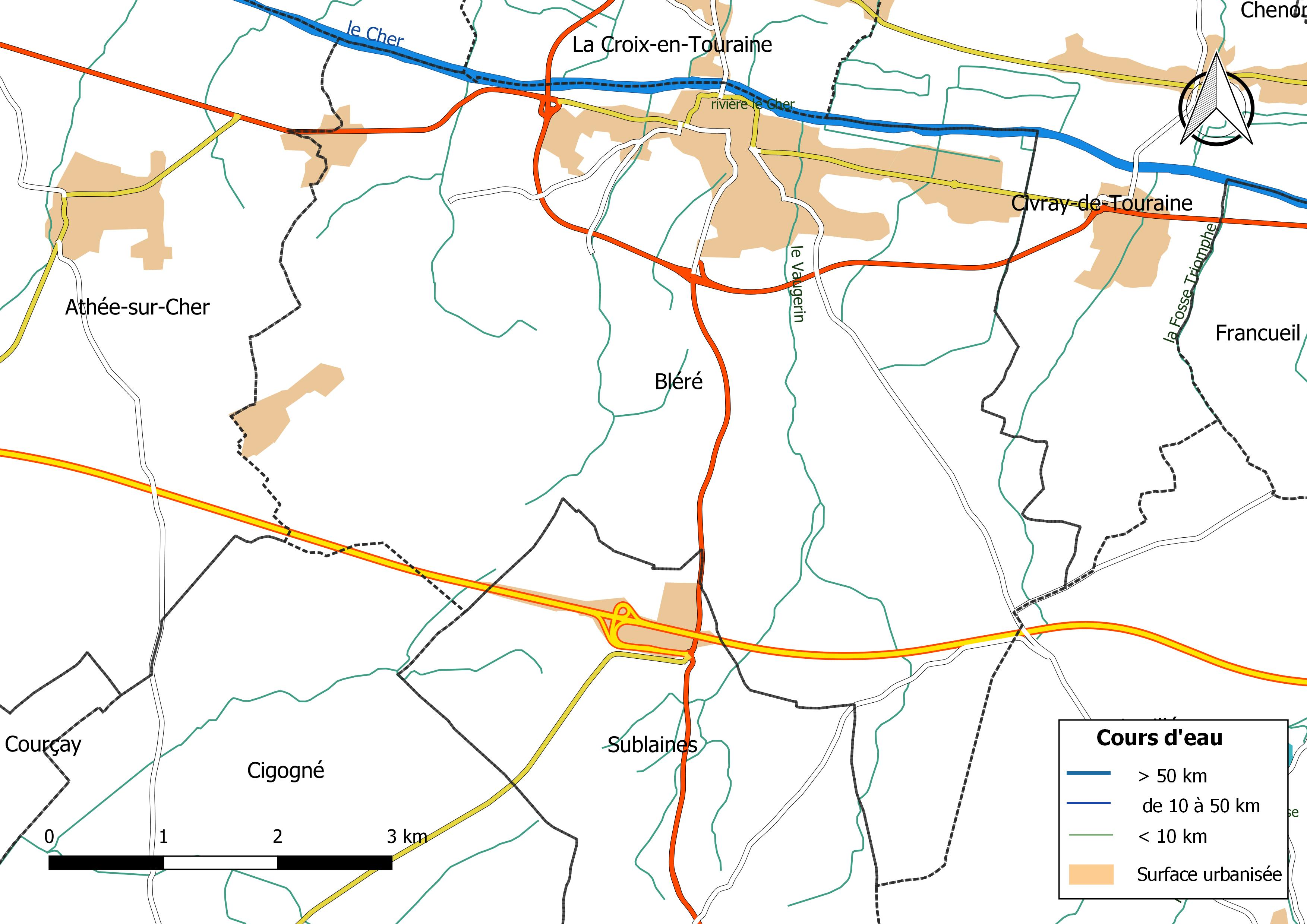 Carte du réseau hydrographique de la commune de Bléré (France).